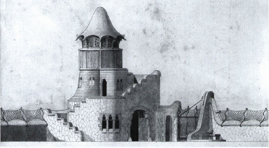 Projecte d'obra de "La Miranda" a Llinars del Valles, obra de Francesc Berenguer (1866-1914), de l'escola de Gaudí. Va ser enderrocada el 1962.